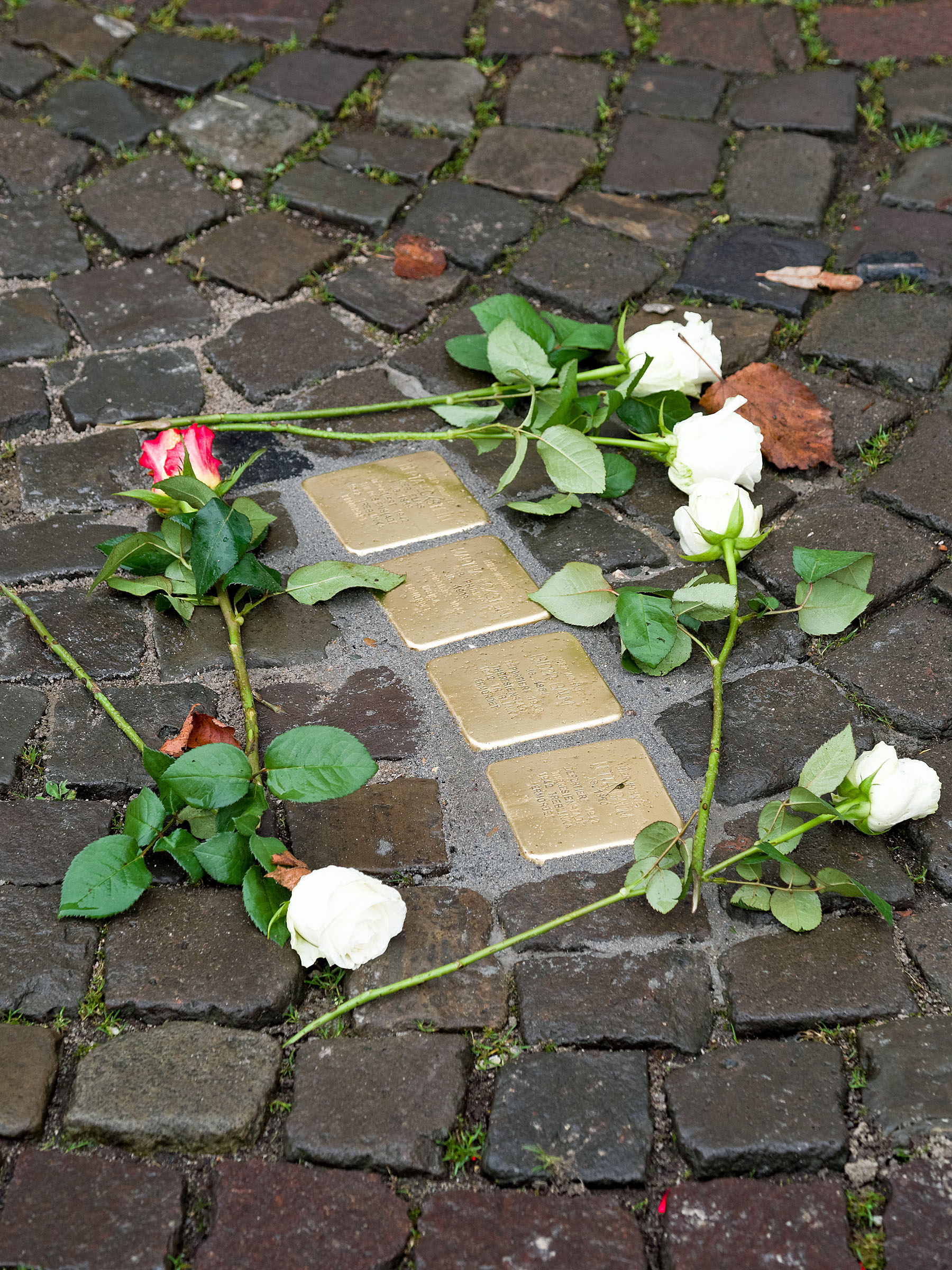 Stolpersteinverlegung Lindenplatz, Süchteln (05.12.2018)